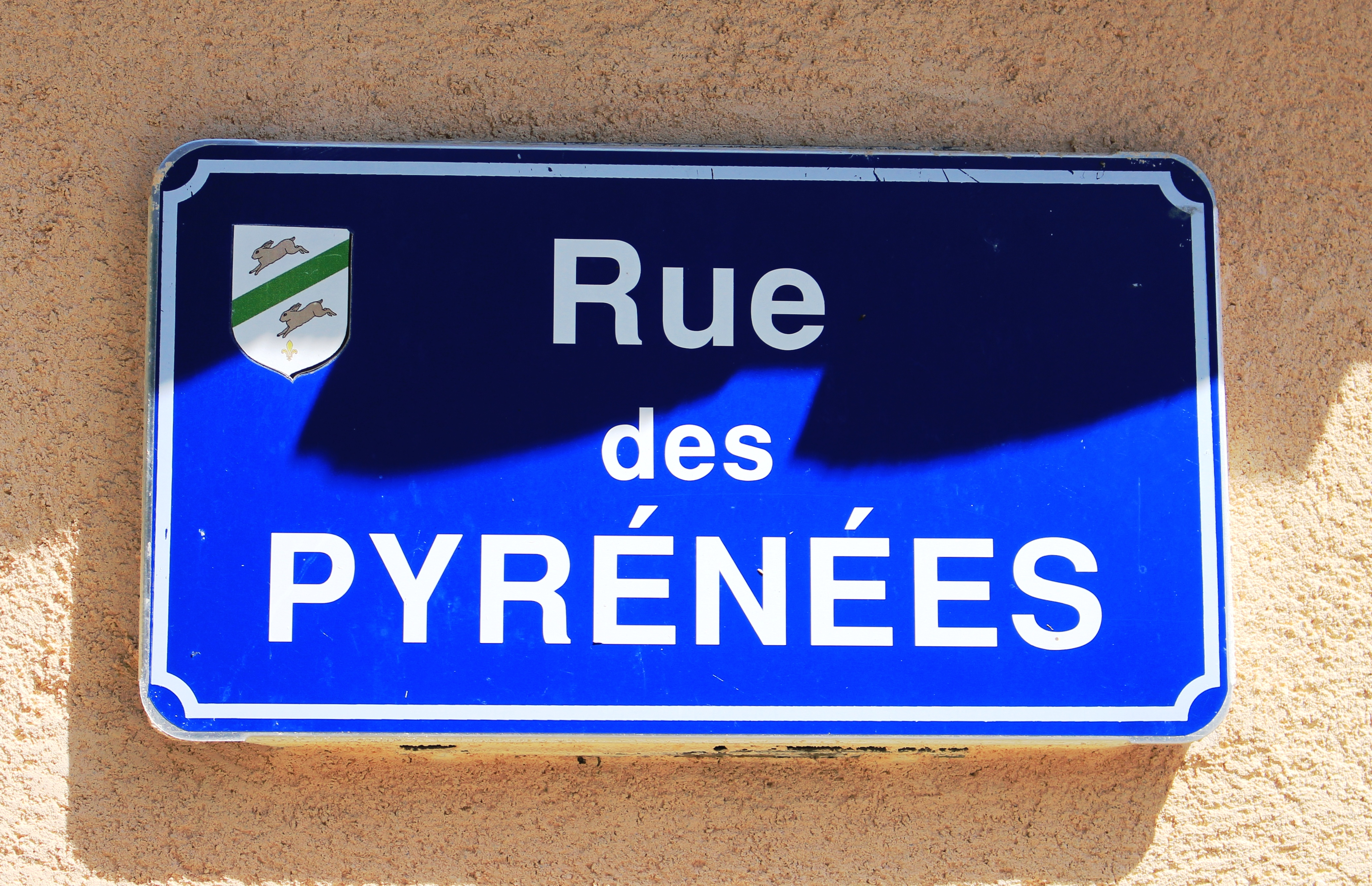 Rue du village de Soréac (Hautes-Pyrénées)